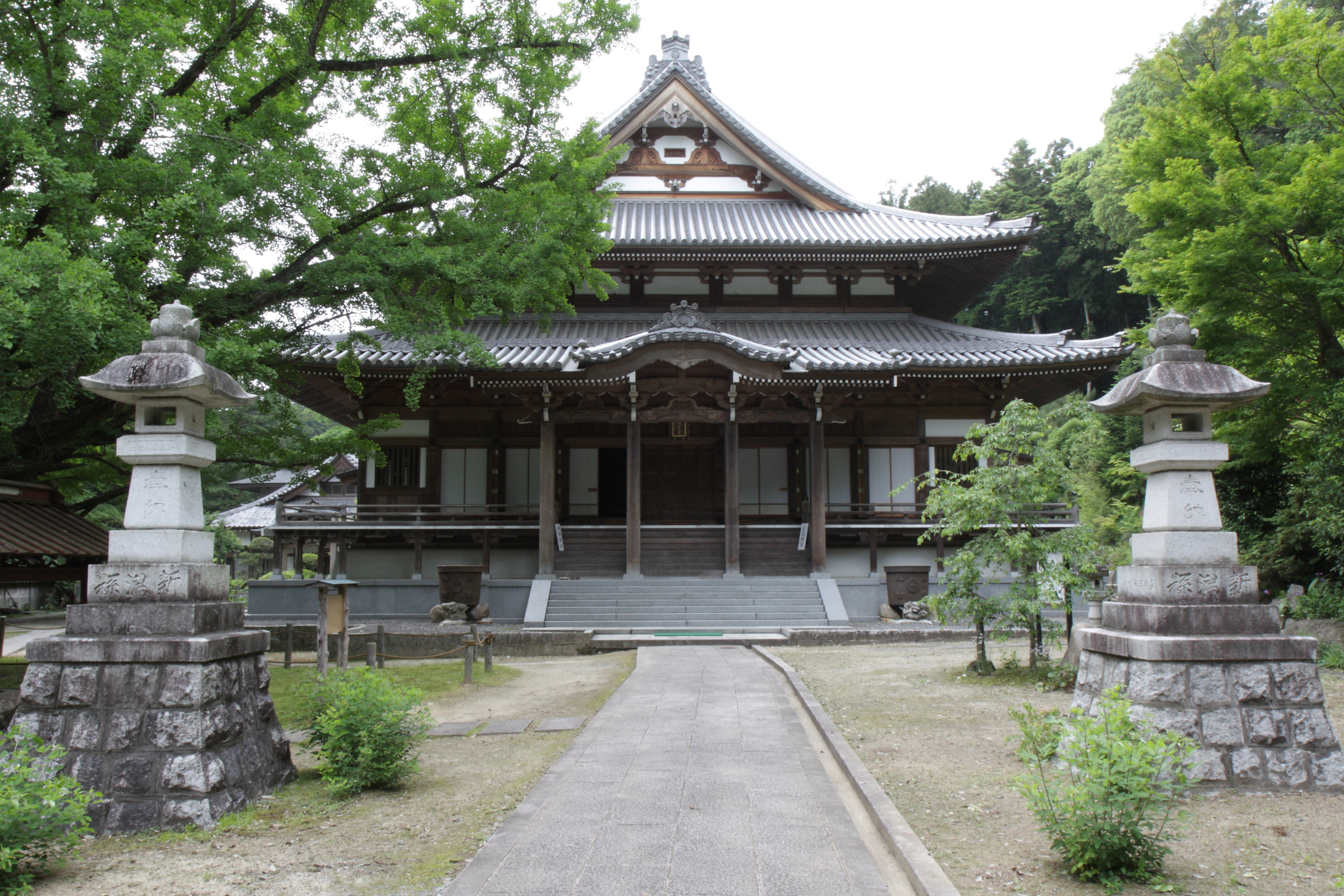 稲田御坊西念寺本堂